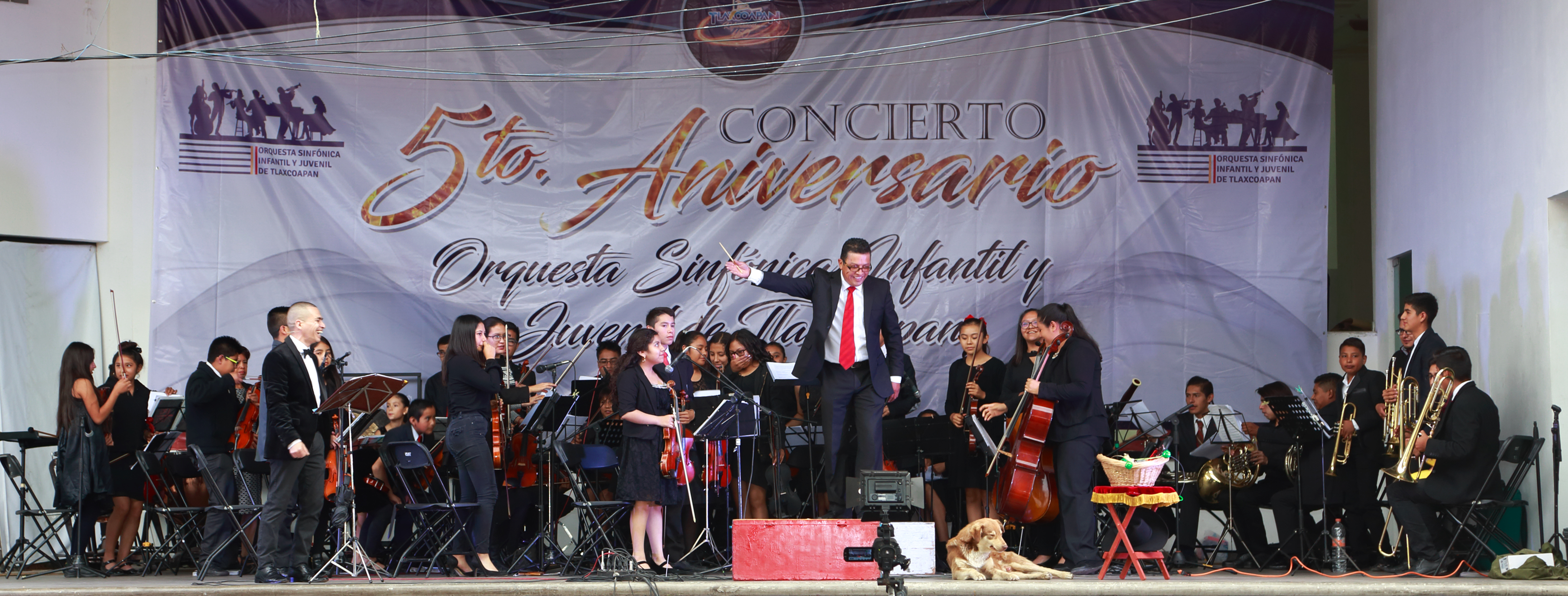 Concierto 5to. Aniversario Orquesta Sinfónica Infantil y Juvenil de Tlaxcoapan Centro Cultural Tlaxcoapan 13-07-19